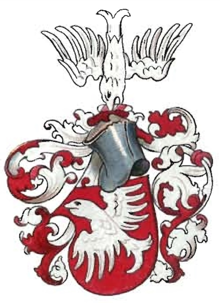 Erb pánů z Bergova